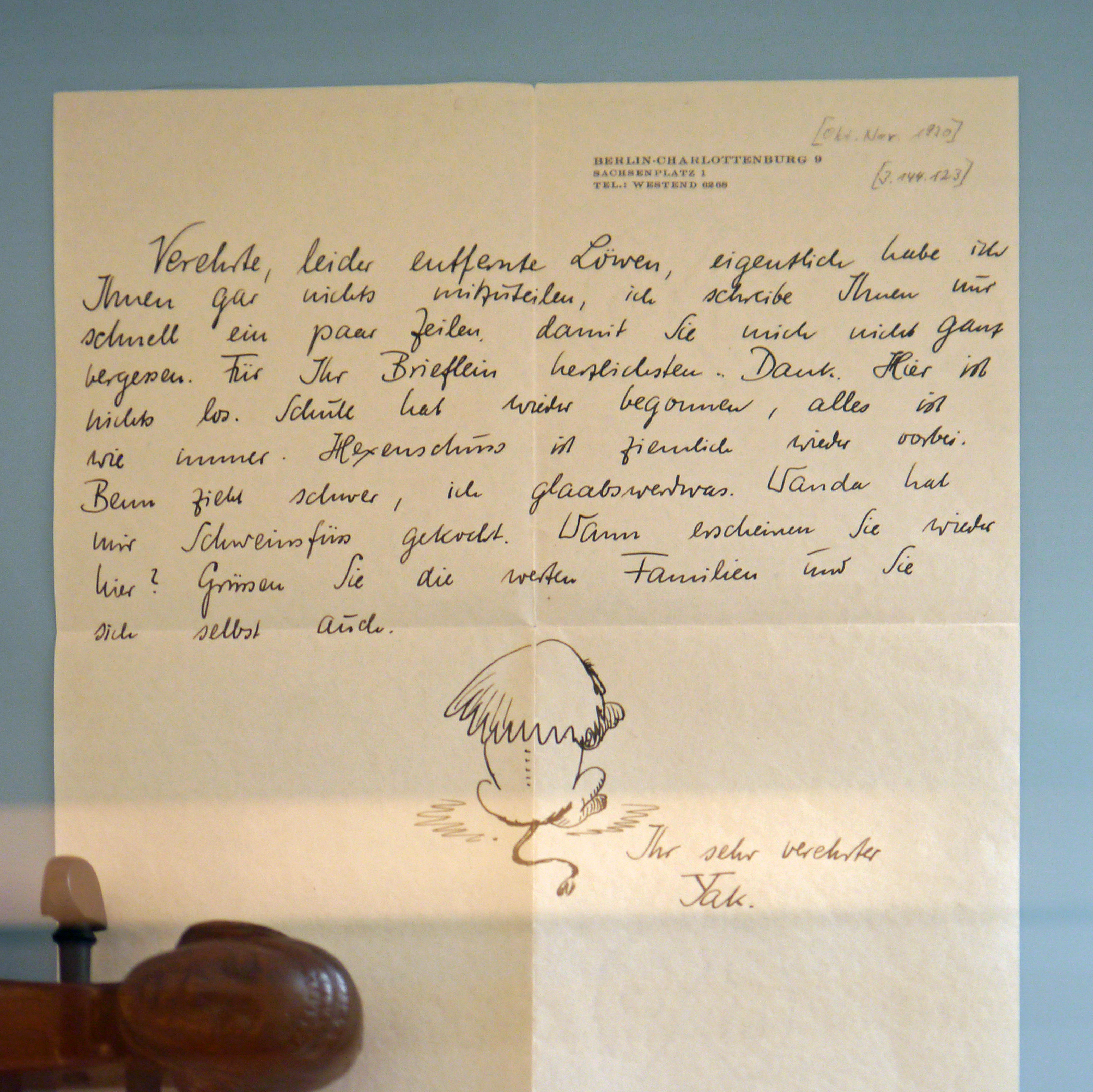 Persönlicher Brief Paul Hindemiths an seine Frau Gertrud, von 1930, im Hindemith Kabinett im Kuhhirtenturm in der Großen Rittergasse, 2017 in Frankfurt-Sachsenhausen.